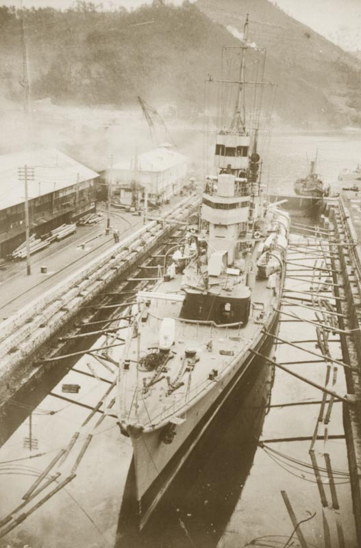 在日本船塢中裝配主砲的"平海"艦